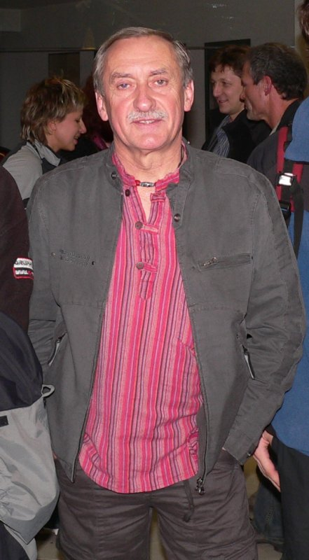 Krzysztof Wielicki - polish climber